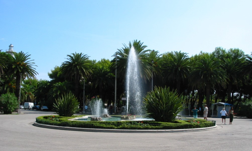 San Benedetto del Tronto, Marche, ItaliaFontana di San Benedetto del Tronto Marche